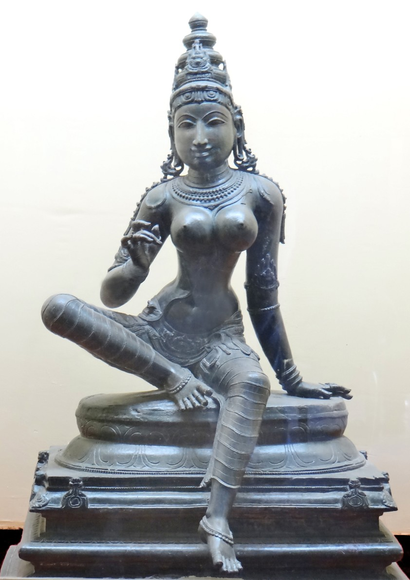 Boga Sakthi Amman (ou Boga Shakti : une des formes de Parvati, la parèdre ou consort de Shiva, ) Boga Sakthi est le symbole de la mère universelle dans la tradition Chola, elle est représentée assise dans la pose royale et tenant un lotus. Oeuvre provenant de Kadalangudi XIIè-XIIIè siècle bronze Dans l'Hindouisme, la Shakti est l'énergie omniprésente et donc l'aspect créateur du divin, c'est pourquoi elle est considérée comme femelle. Sans elle, Shiva ne peut rien faire, il doit s'unir à elle pour devenir principe actif (le lingam/Shiva embrassé par le yoni/Parvati).